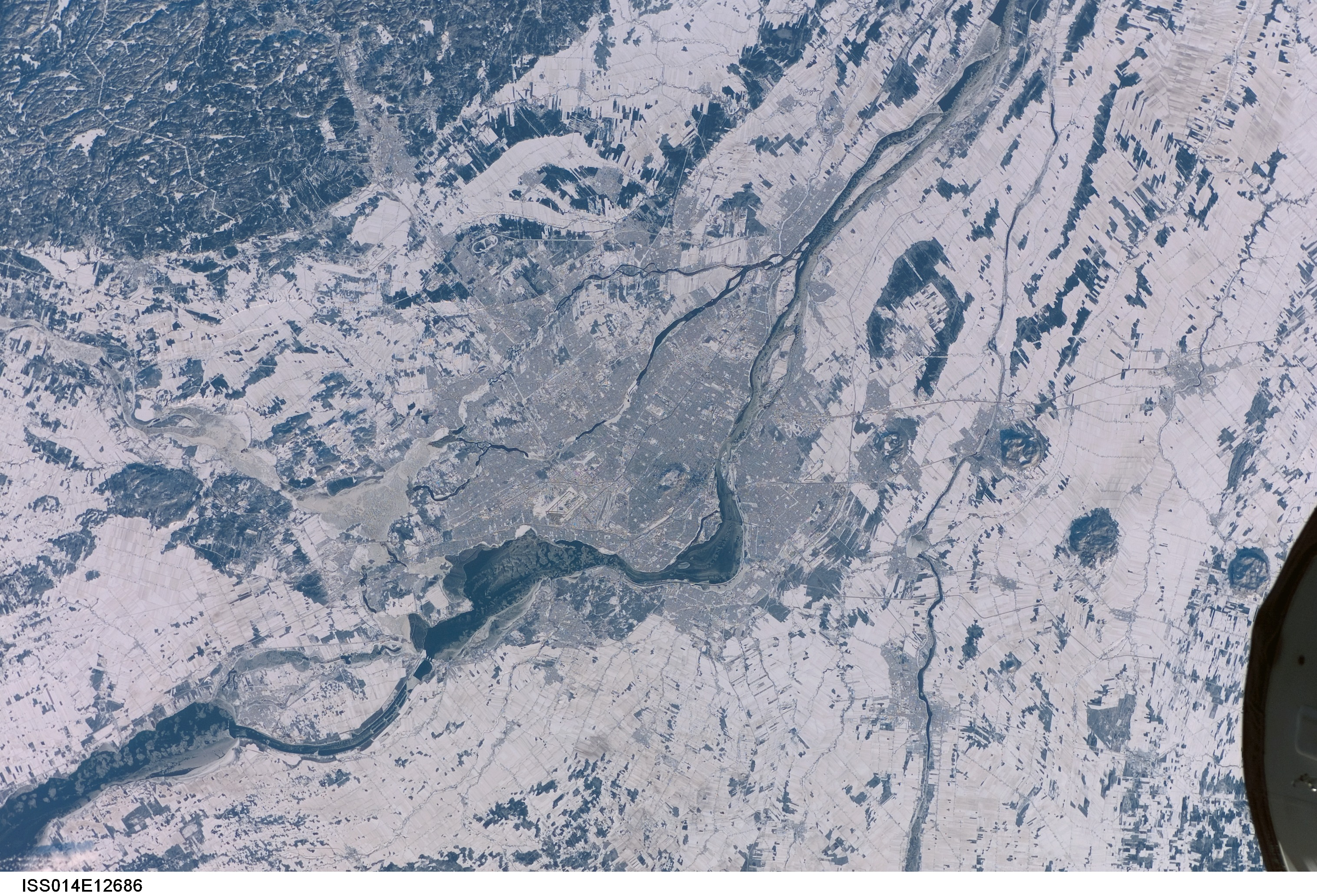 La région montréalaise vue de l'espace